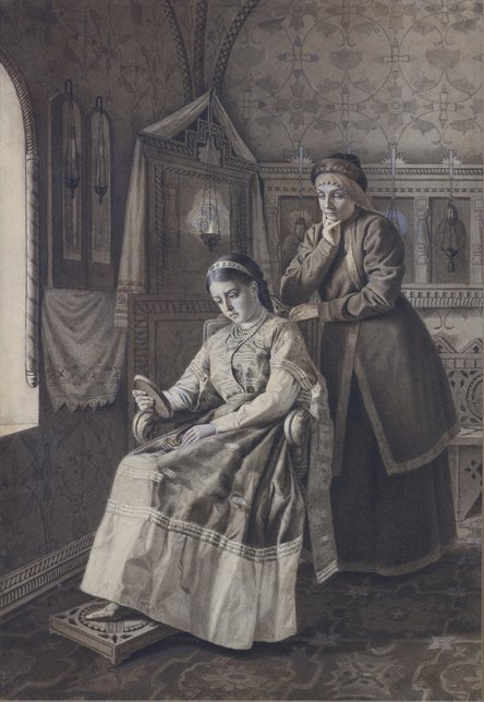 «Царевна Ксения Годунова рассматривает изображение своего жениха» 1890-е годы. Бумага на картоне, смешанная техника. 35,5 × 24 см. Слева внизу подпись: «Винцманъ».